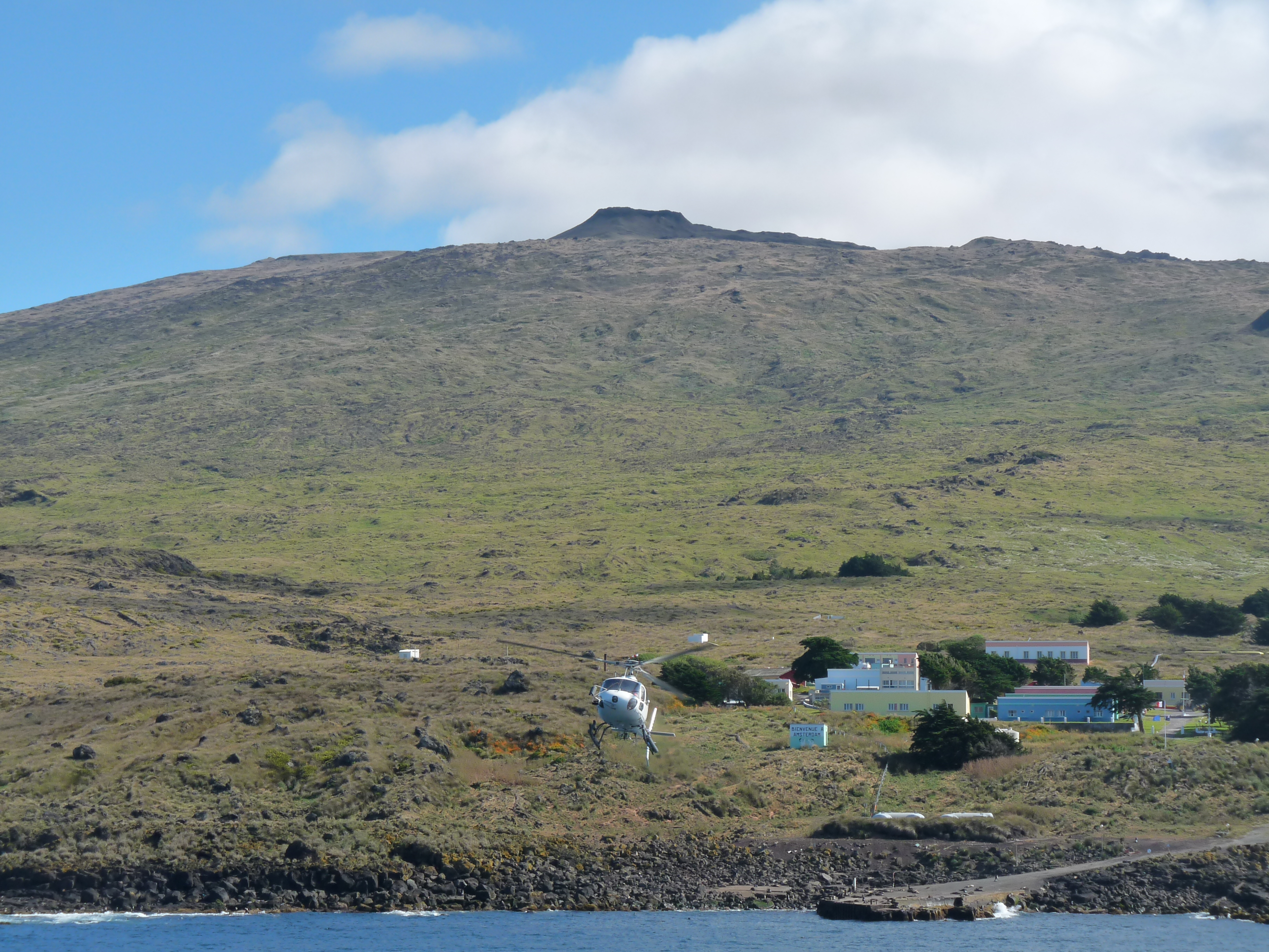 Martēndevivjē pētniecības stacija ar Dimā krāteri fonā